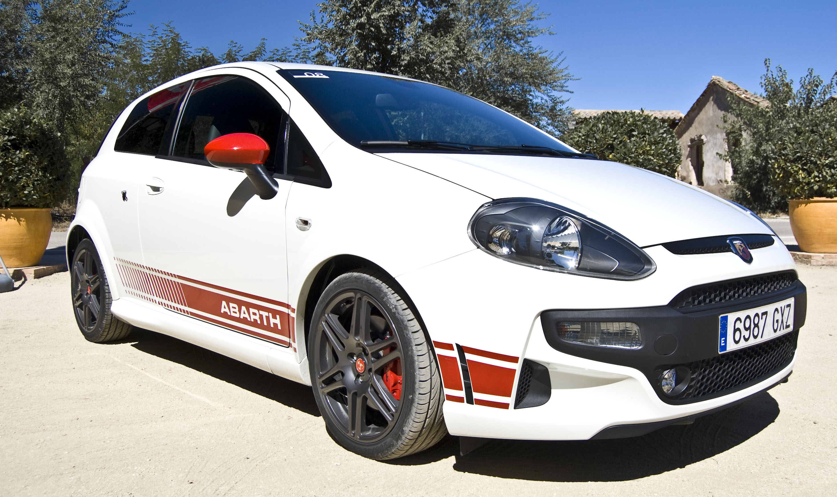 Prueba del Abarth Punto Evo en Diariomotor